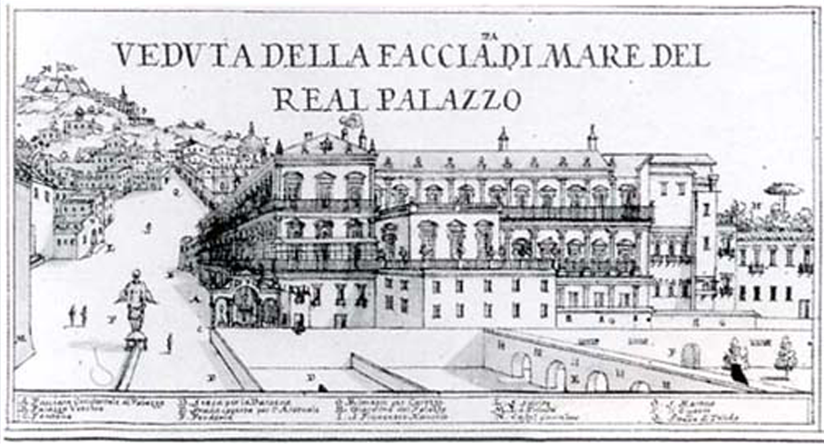 Palazzo Reale di Napoli, 1700s